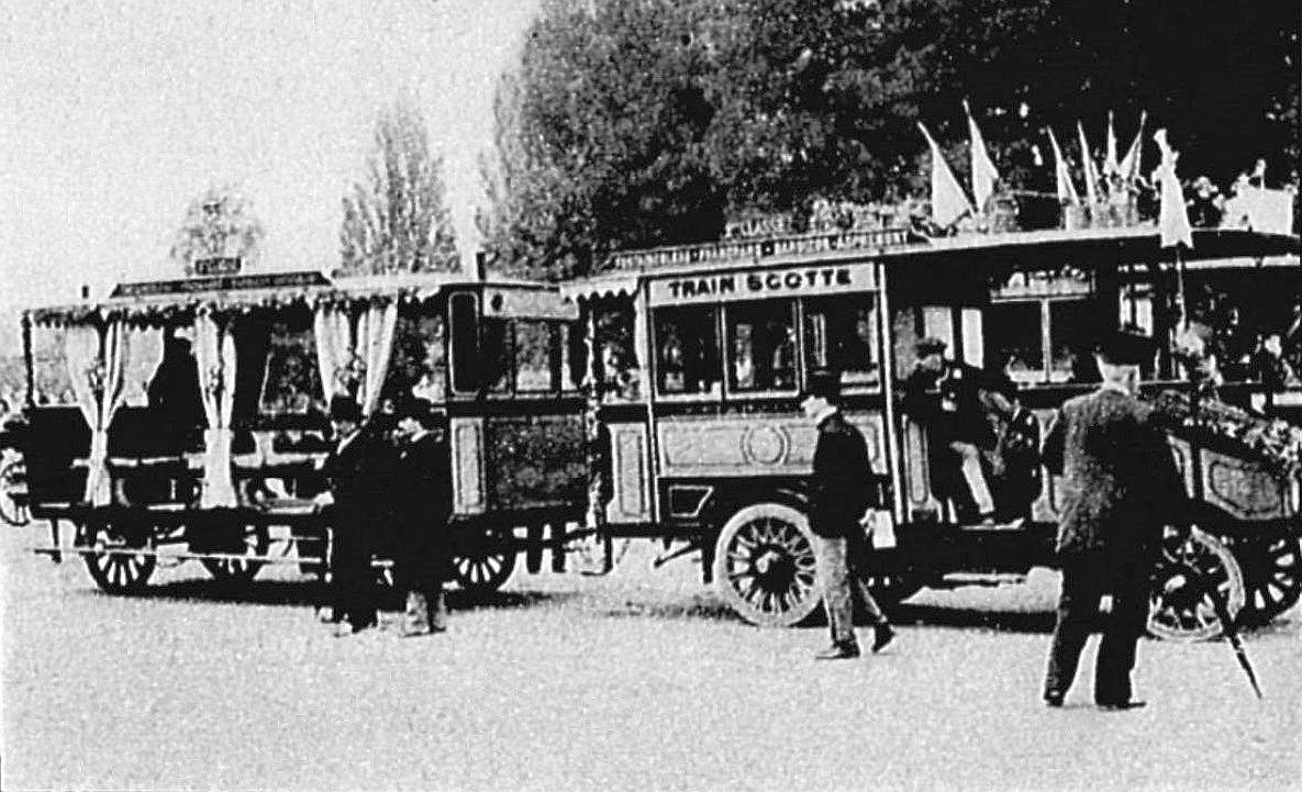 Train Scotte, version omnibus à vapeur (1899)